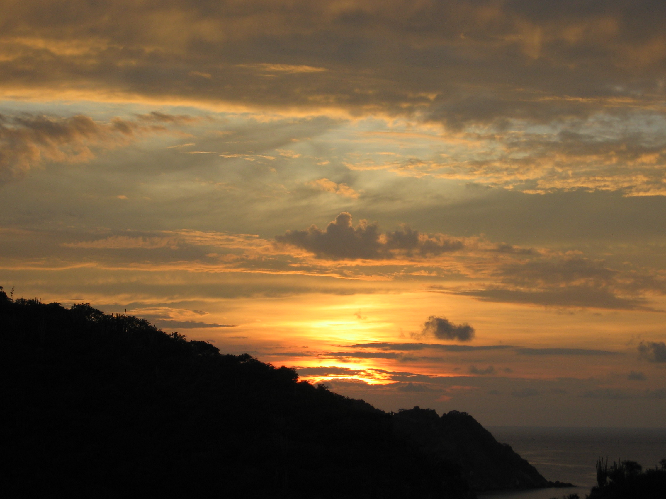 Atardecer en Taganga. Sunset in Taganga. Taganga, Santa Marta, Magdalena, Colombia.